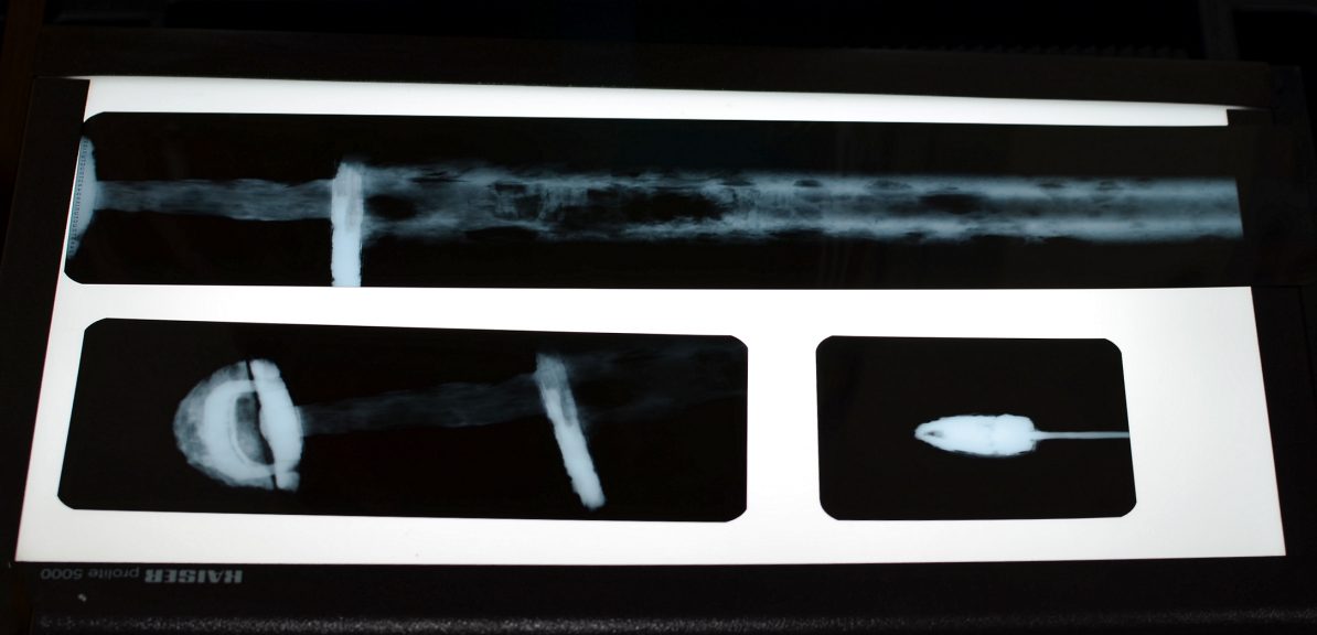 Computertomografie (CT)-Aufnahme des Schwertes von Großenwieden in den archäologischen Restaurierungswerkstätten des Niedersächsischen Landesamtes für Denkmalpflege